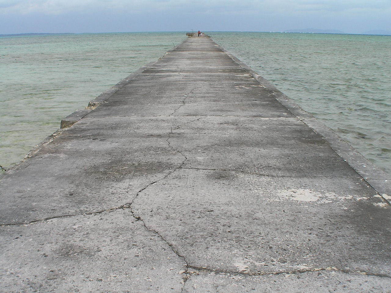 黒島の伊古桟橋